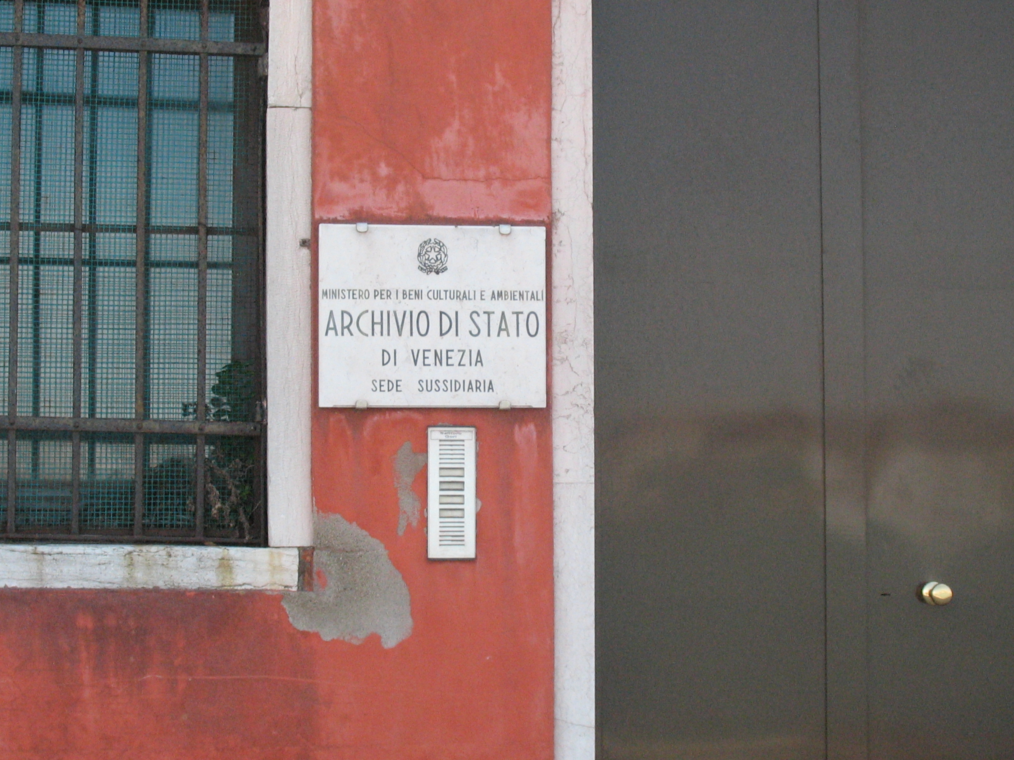 entrata dell'archivio di stato di Venezia, sede sussidiaria, Giudecca